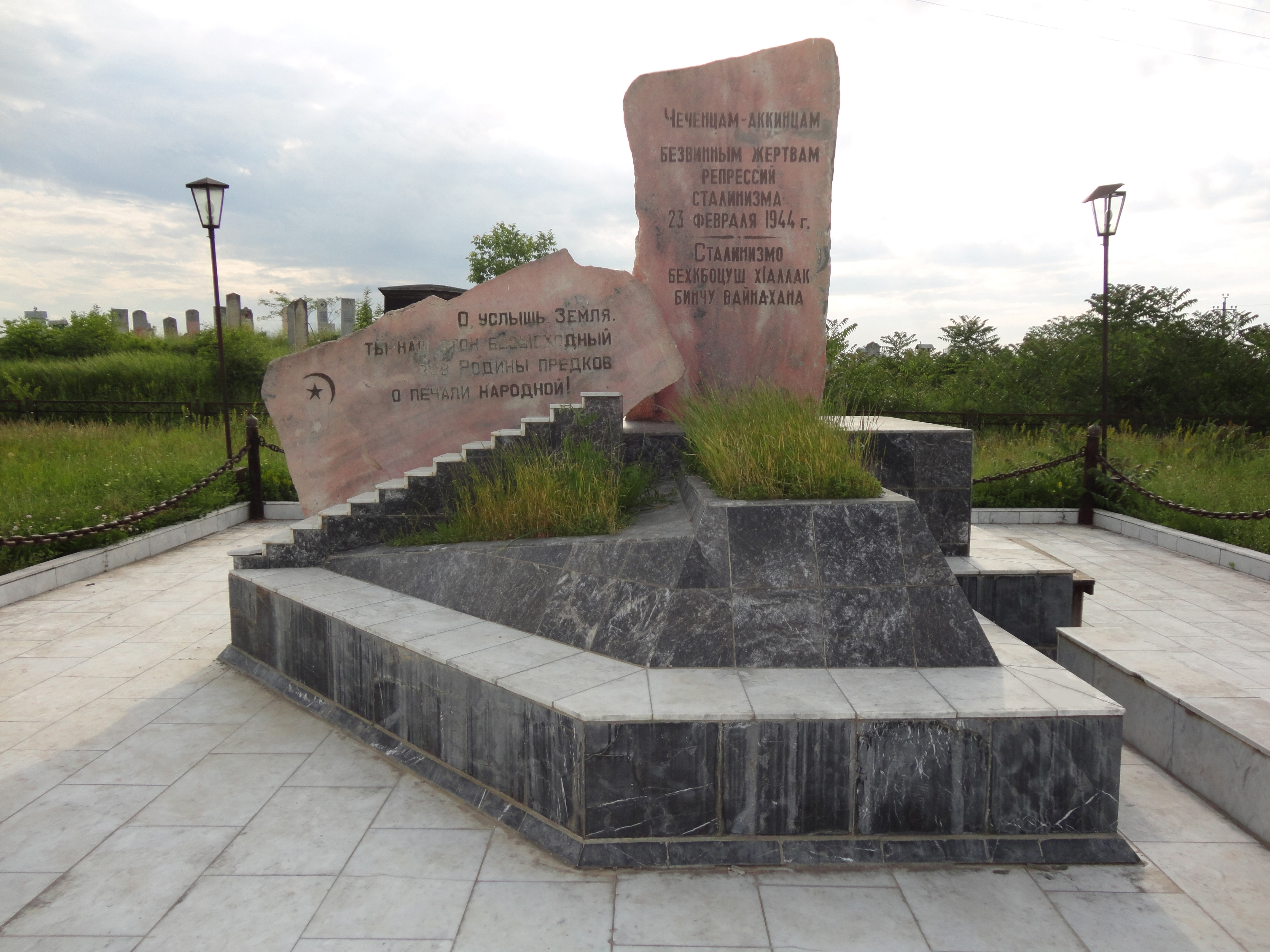 Нохчийн: Сталинизмо бехк боцуш х1аллак бинчу вайнахана